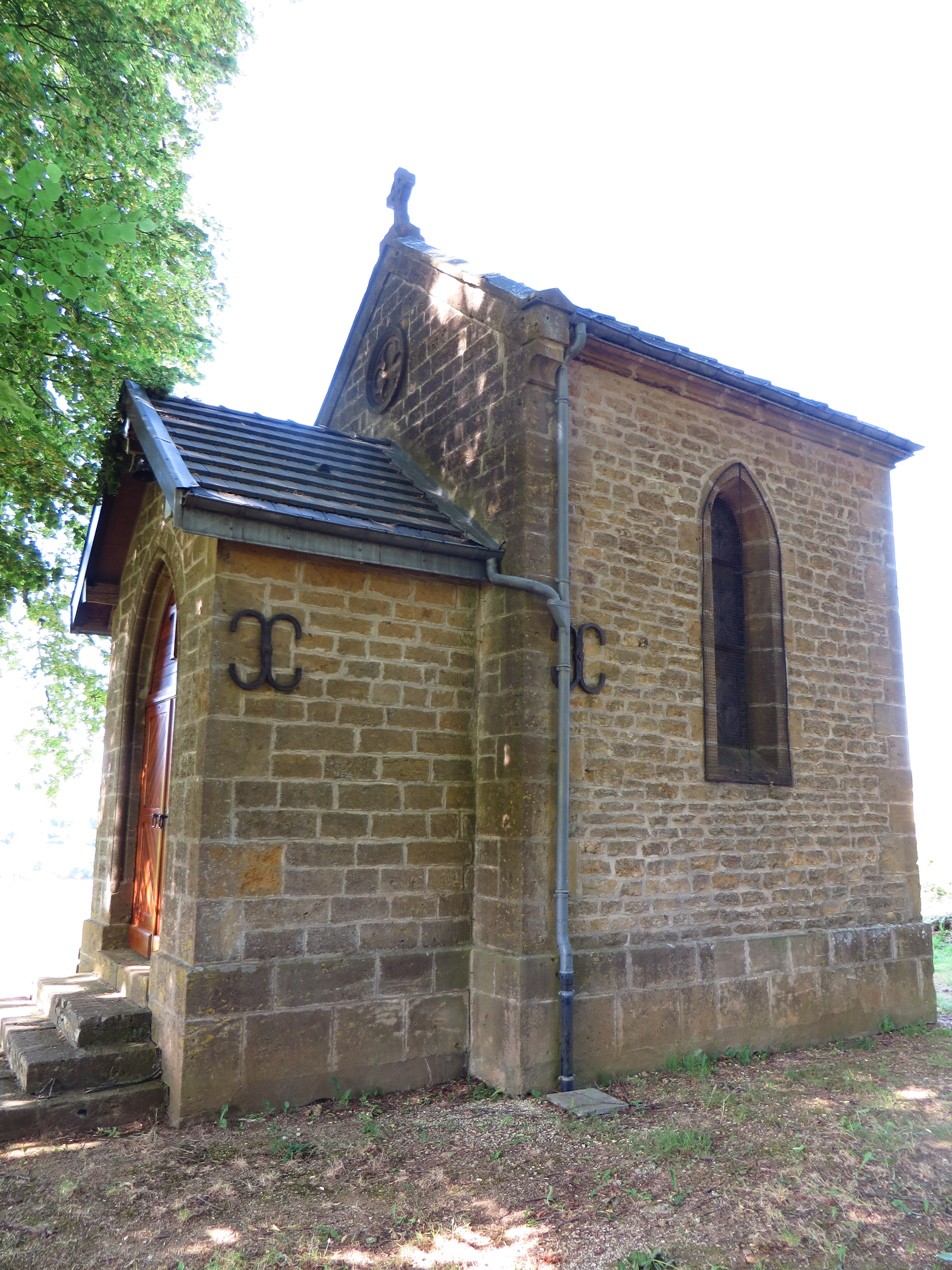 Villécloye La chapelle Sainte-Ernelle